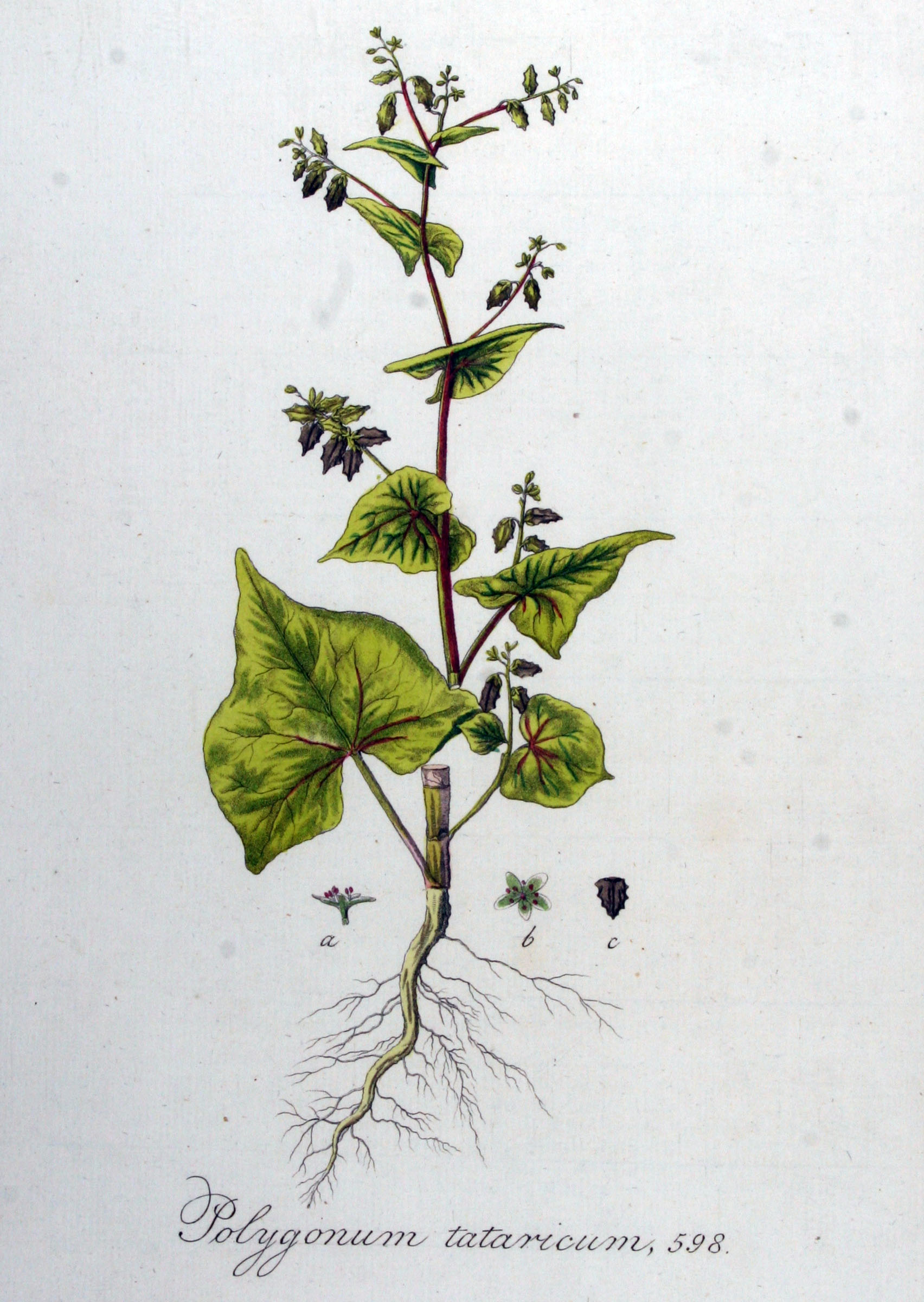 Fagopyrum tataricum (L.) Gaertn. (Syn. Polygonum tataricum L.)